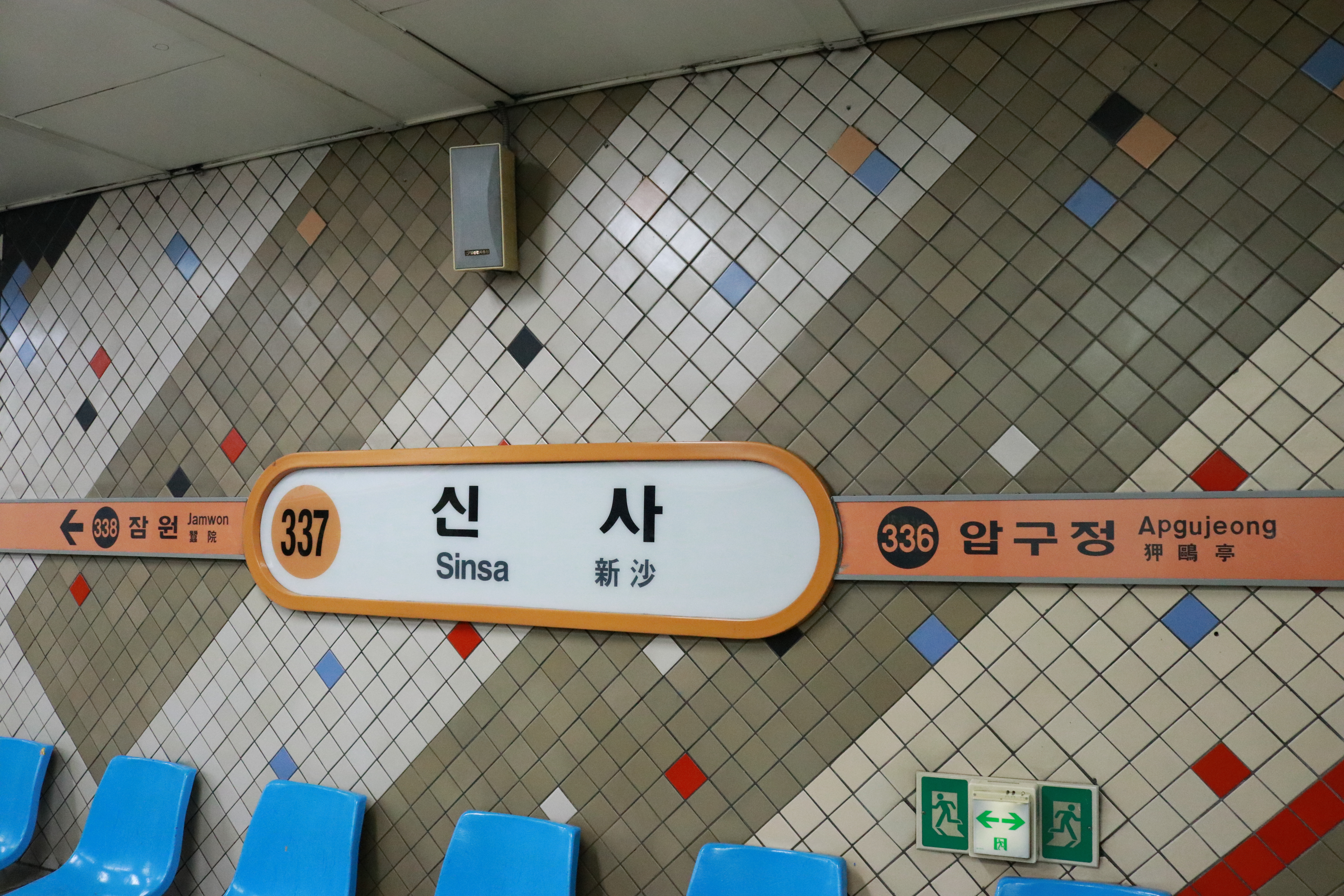 신사역 역명판